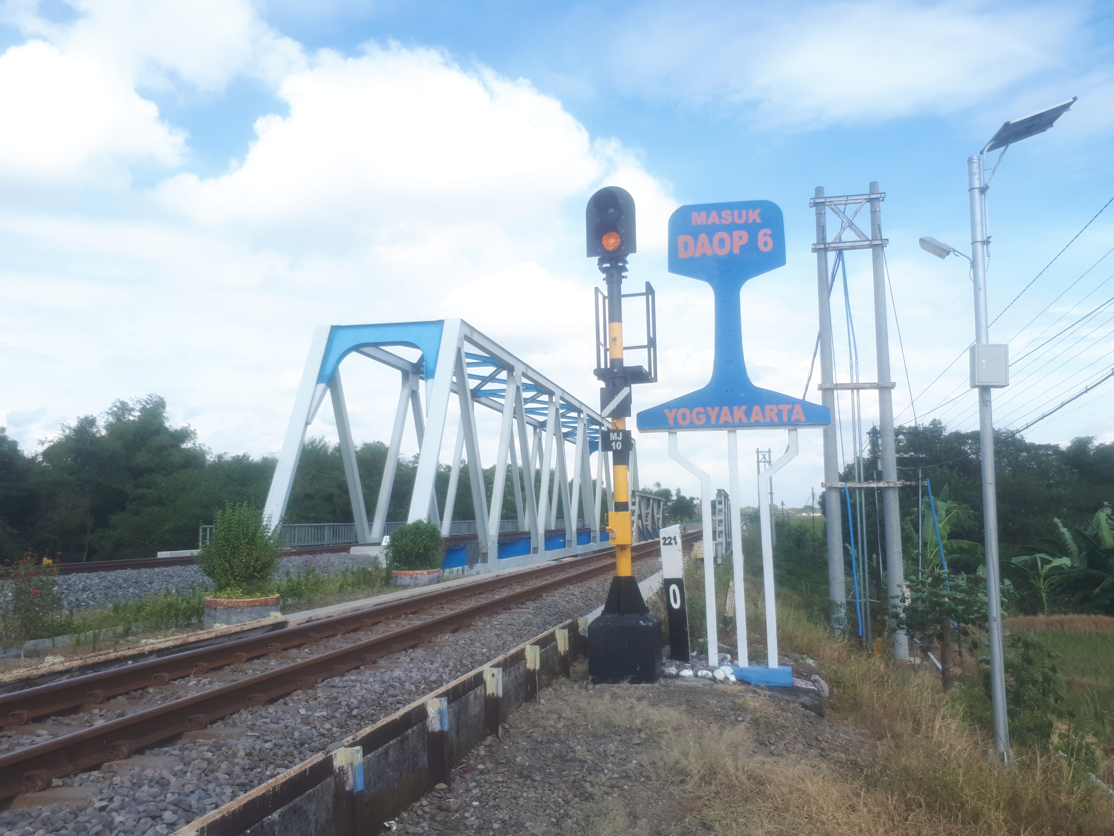 Pembatas Daerah Operasi VII Madiun dan Daerah Operasi VI Yogyakarta, 2020